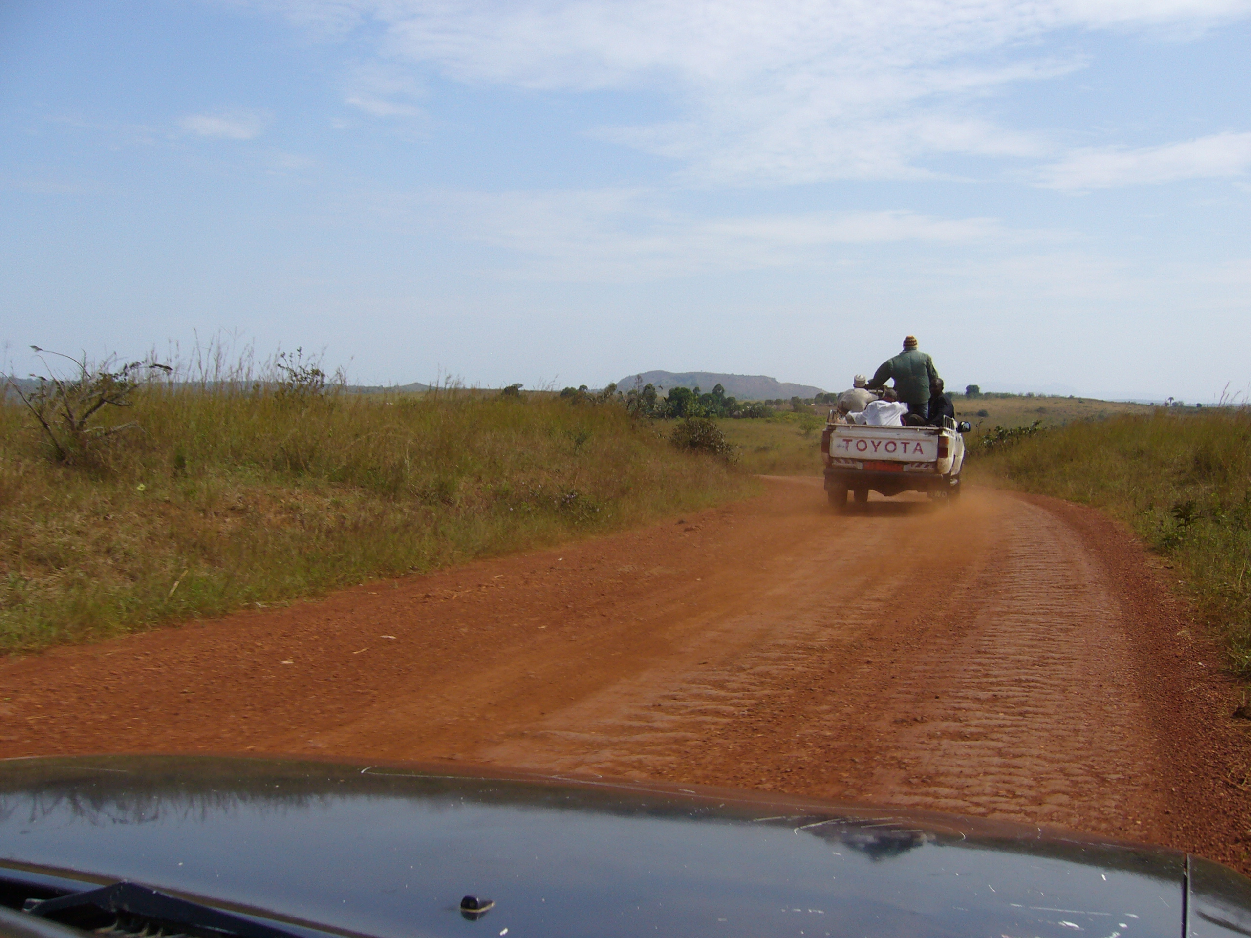 Cameroun - Sur la piste Ngaoundéré-Idool-Balam This is an image with the theme "Africa on the Move or Transport" from: Cameroon